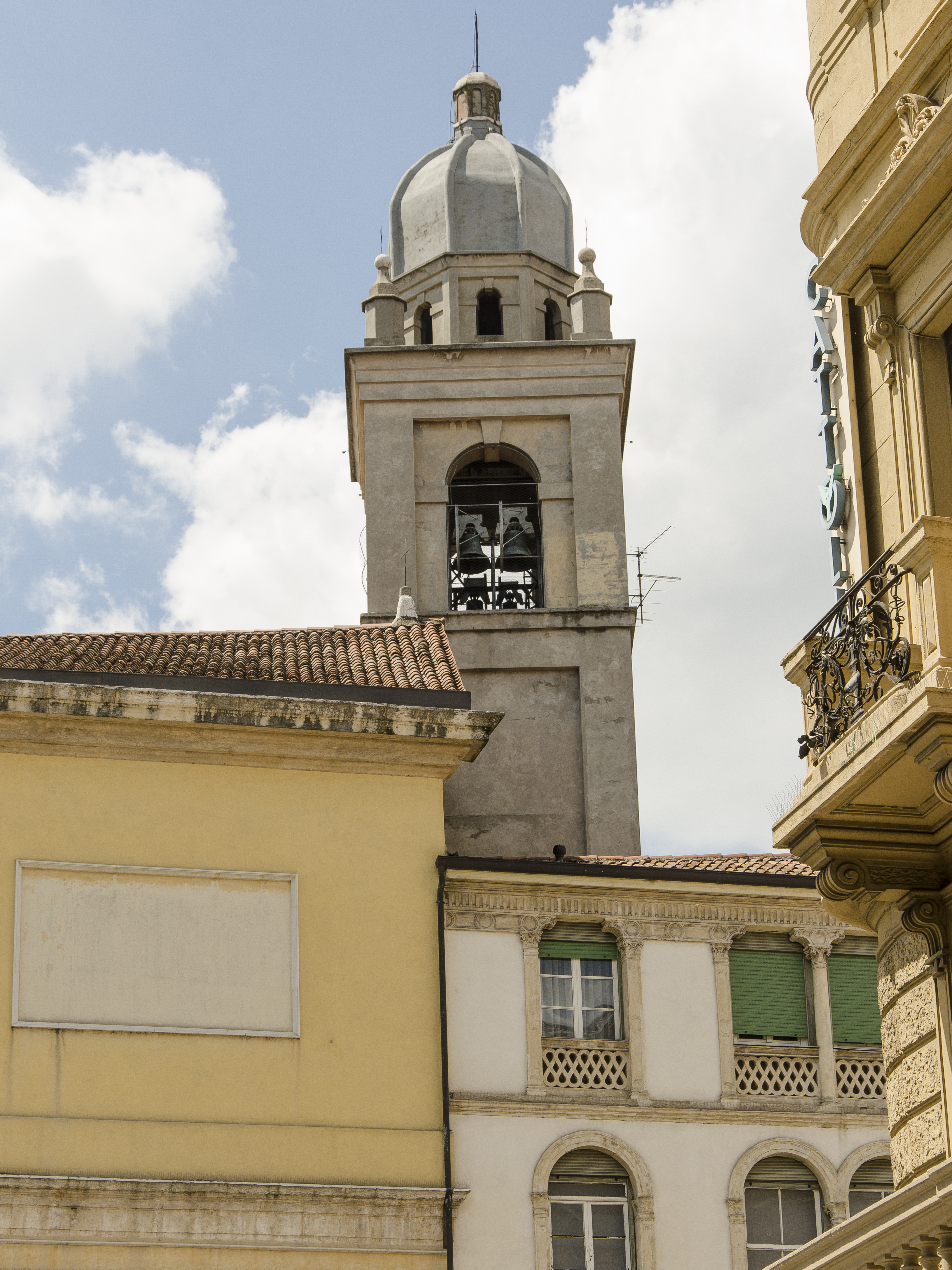 Chiesa di San Luca Evangelista, campanile, Verona